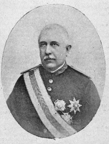 José de Bascarán y Federic